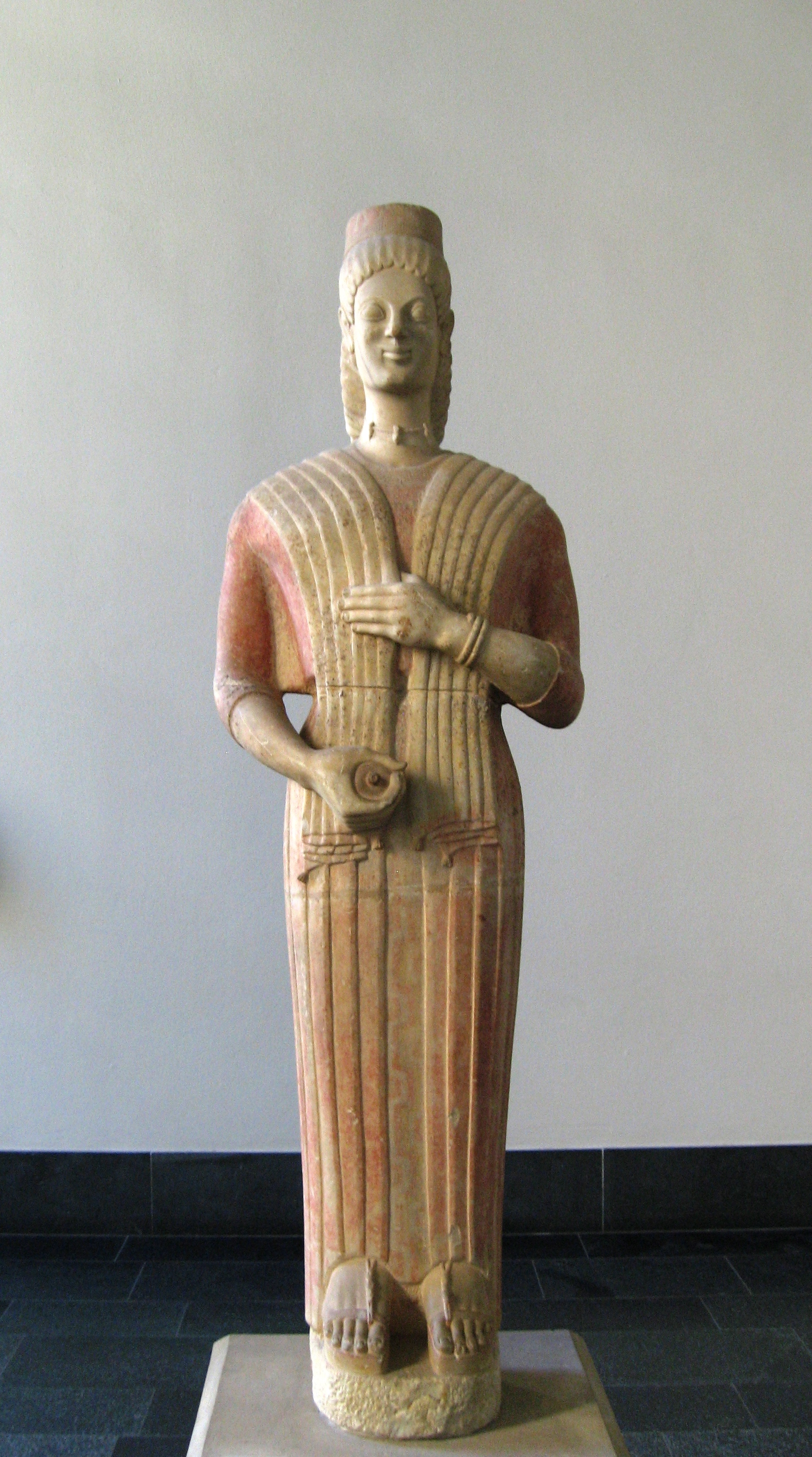 Frauenstatue mit Granatapfel. Gefunden in Keratea (Südattika). 580-560 v. Chr. Marmor.